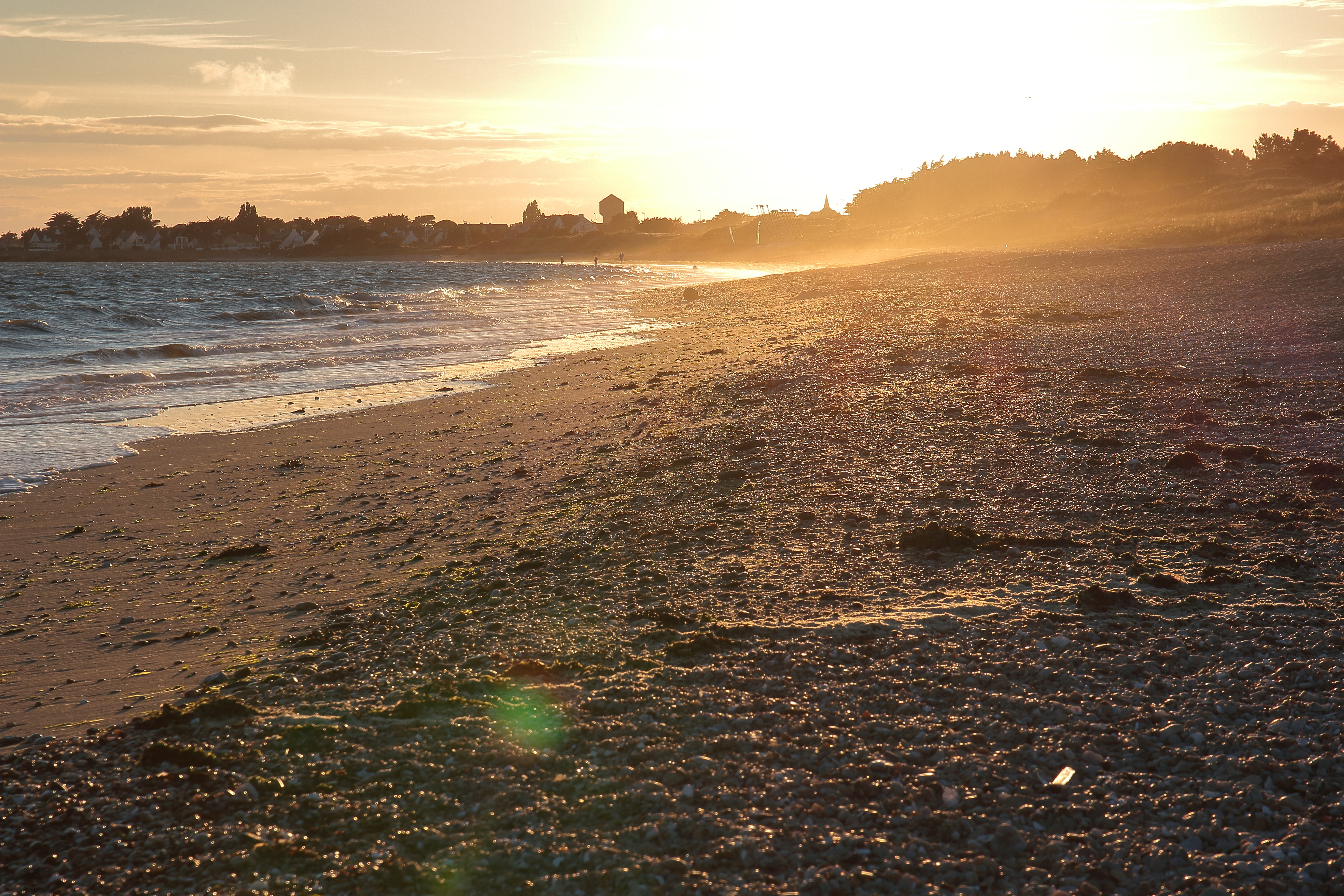 Der nach Westen ausgerichtete "Grosse Strand von Kervoyal", Ortsteil von Damgan (Morbihan, Bretagne, France)